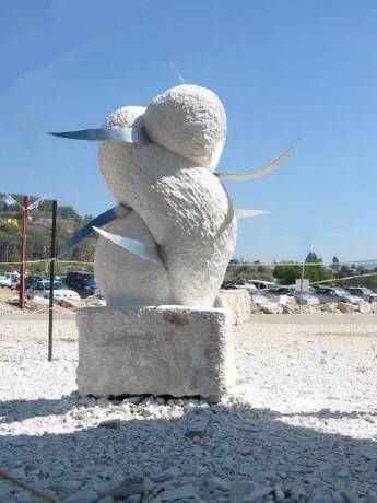 הפסל בגובה 250 ס"מ, נוצר בשנת 2002 במסגרת סימפוזיון בינלאומי לפיסול באבן במעלות תרשיחא